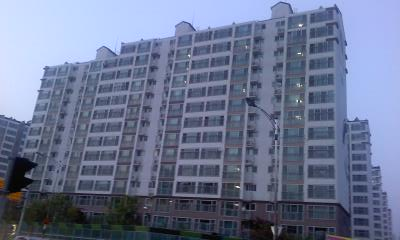 산남동에 있는 부영아파트